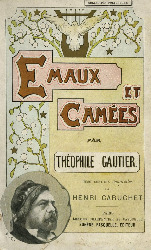 Couverture de Émaux et Camées de Théophile Gautier, livre publié chez Fasquelle à Paris en 1895. Illustrations intérieures : Henri Caruchet.